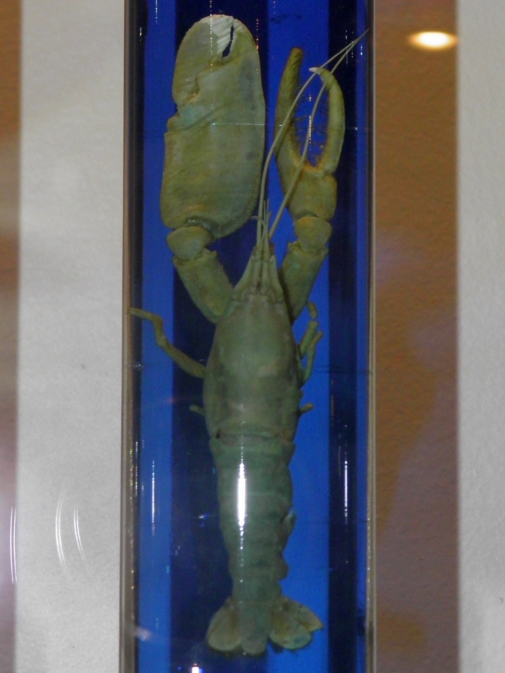 Alpheus brevicristatus в Научном музее ДВФУ (г. Владивосток)